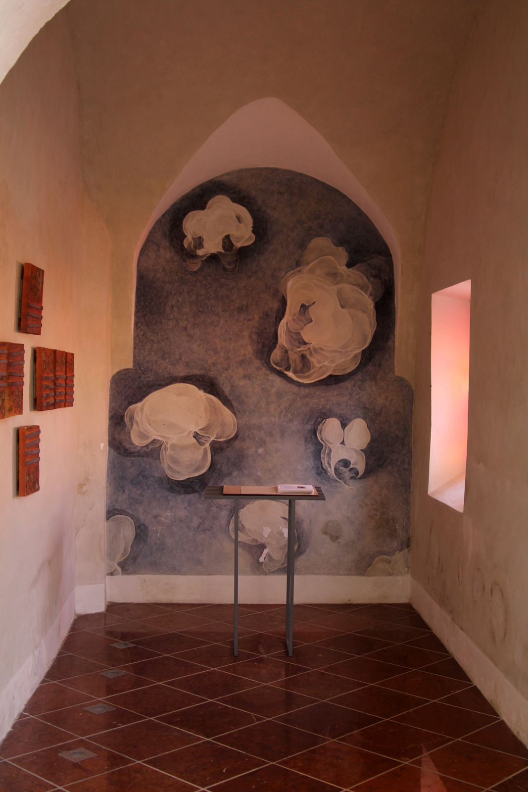 Auferstehungskapelle der Pfarrkirche St. Laurentius Altheim, OÖ